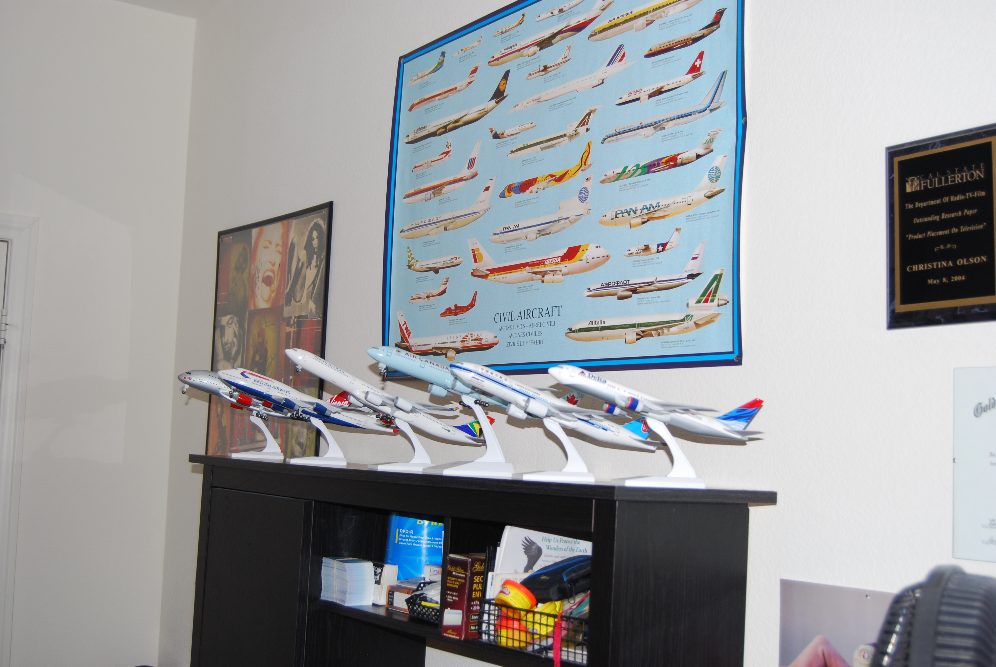 Part 2